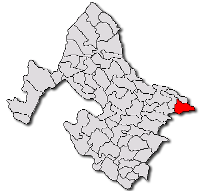 Categorie:Hărţi ale judeţului Mehedinţi